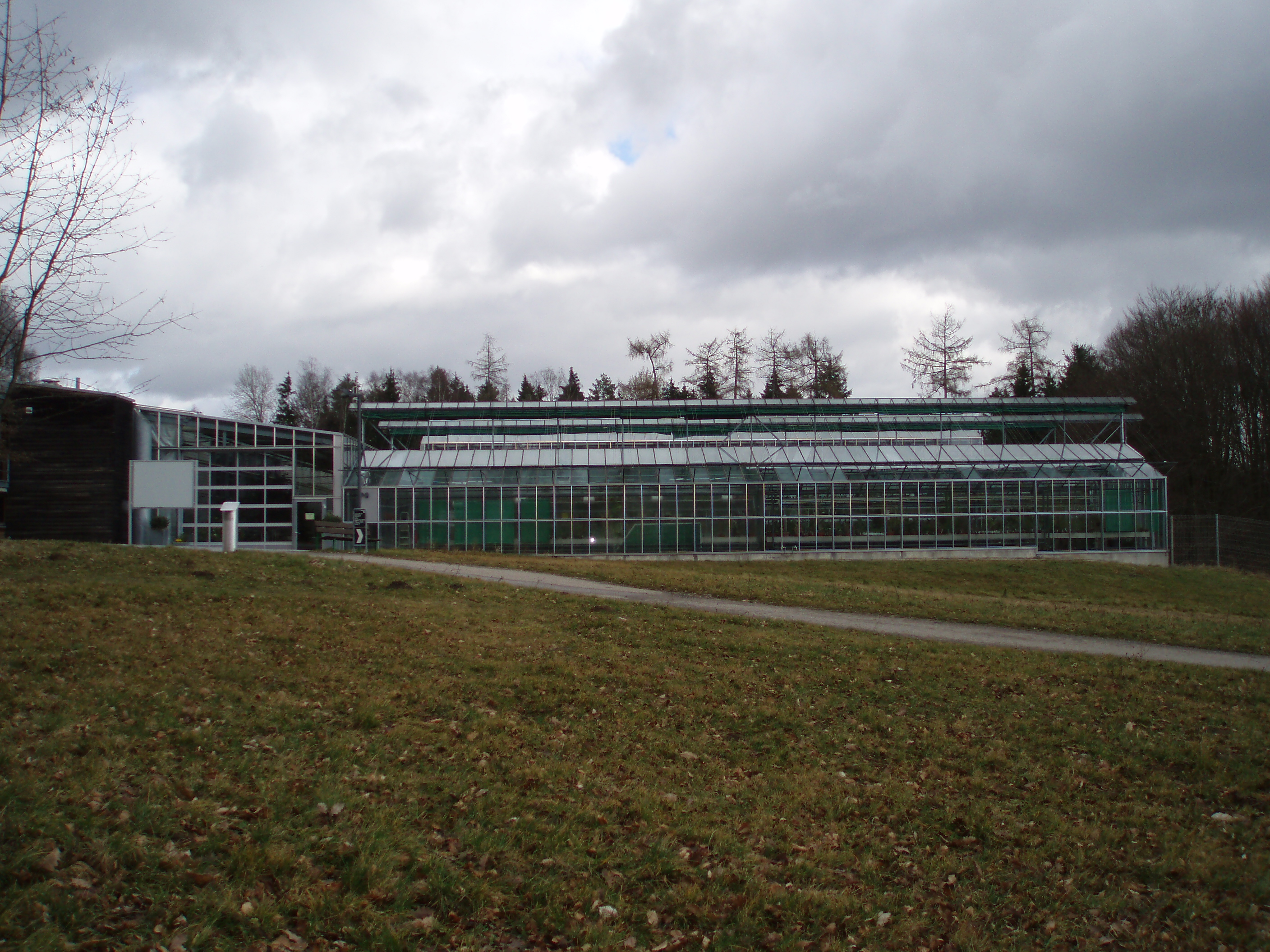 Botanischer Garten Ulm: Das Gewächshaus